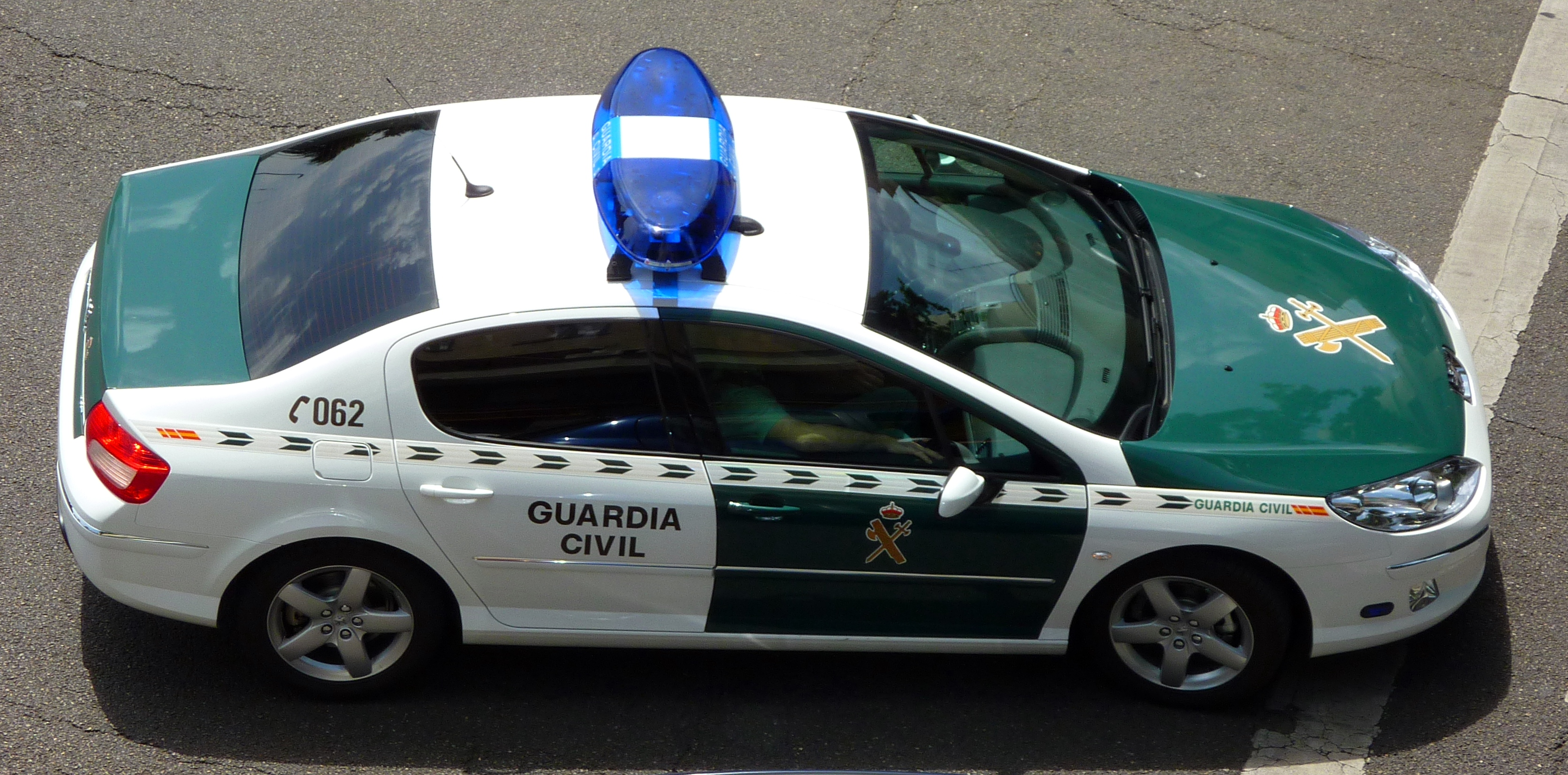 Peugeot 407 de la Guardia Civil.